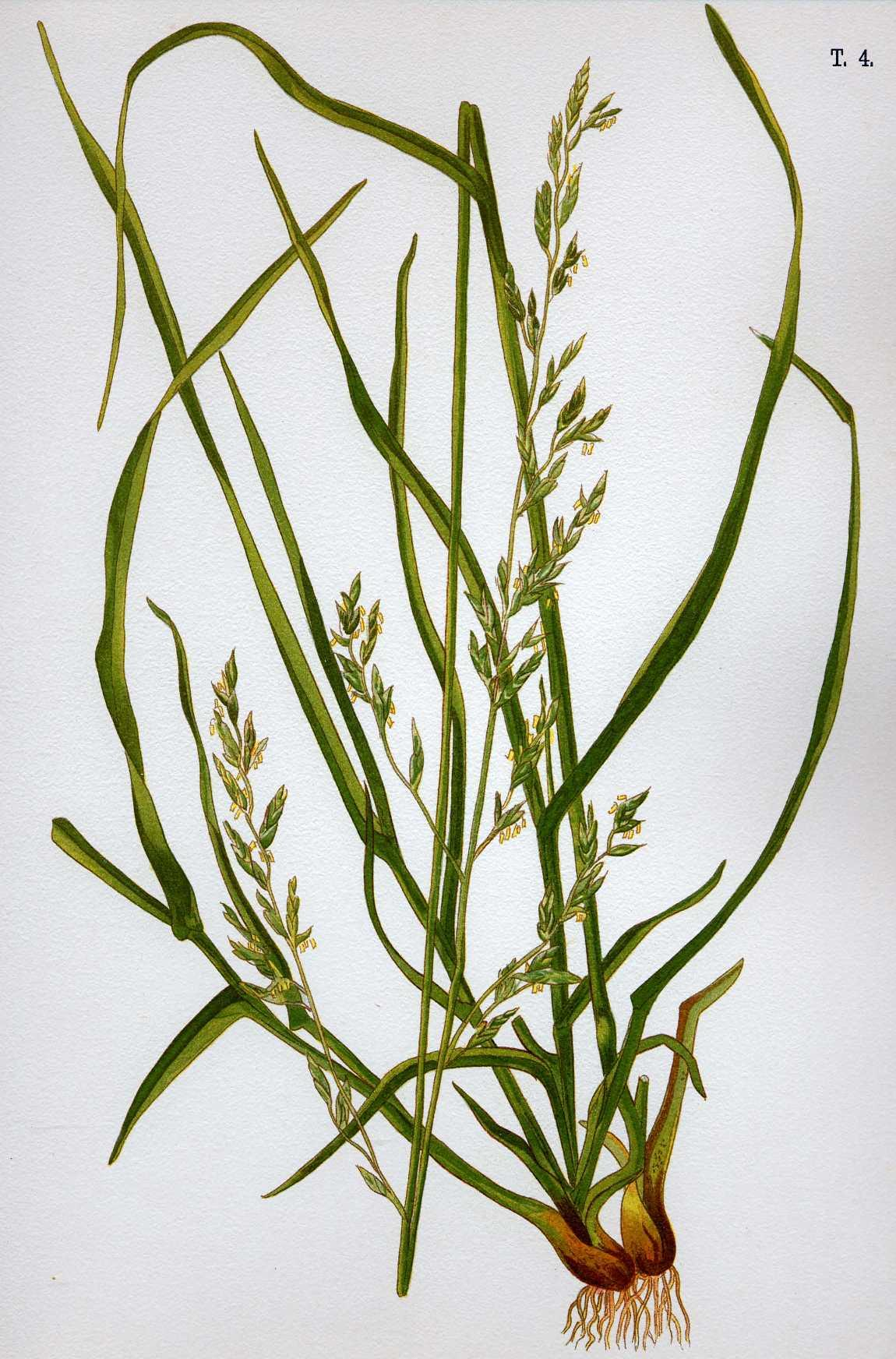 Овсяница луговая (заноска луговая)